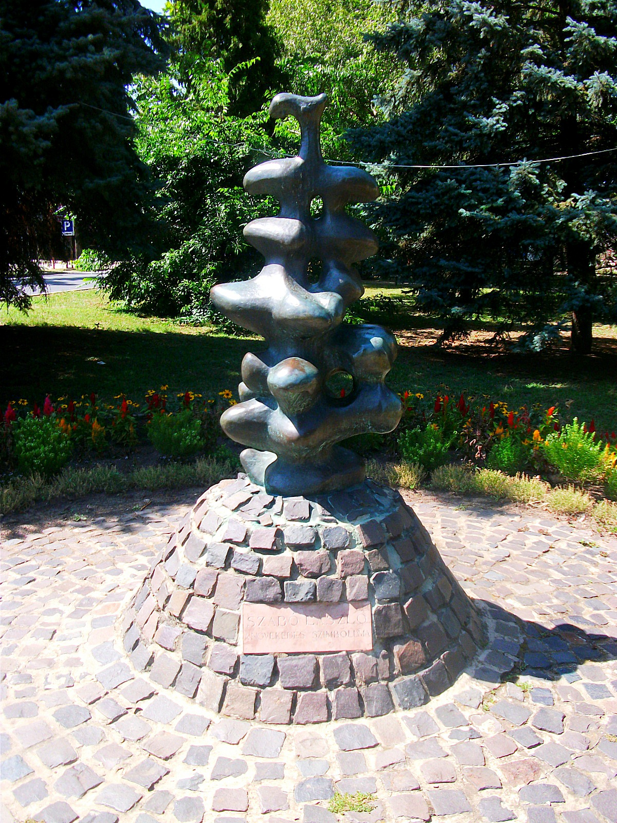 A növekedés szimbóluma nevet viselő szobor Hajdúszoboszlón, a Szent István parkban. A szobort 1992-ben állították fel, mely Szabó László alkotása.